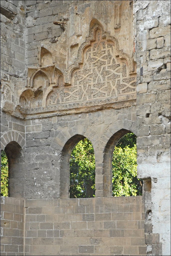 La Cuba était une des résidences, situées en dehors de la ville dans le parc royal appelé Génoarde, construites par les souverains normands de Sicile et destinées à leurs loisirs. La Cuba date de 1180. C'est un édifice rectangulaire initialement orné d'une coupole qui a disparu. Le bâtiment était entouré d'un grand lac artificiel appelé la Peschiara. A l'intérieur, l'espace central avait en son centre une vasque d'où coulait l'eau vers le bassin extérieur. L'intérieur décoré dans le style arabe disposait de voutes à encorbellement en stalactiques (mouqarnas). Le photo en rend compte. Comme pour d'autres résidences arabo-normandes, la façade est ornée de grandes arcatures, sans fenêtres. La façade se termine par une frise épigraphique en caractères coufiques indiquant le nom du roi Guillaume II et la date de construction. Article de Wikipedia sur la Cuba